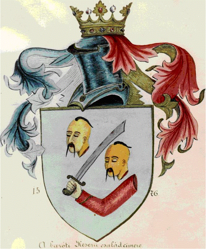 Erdélyi Magyar, Székely nemesi címer egy másolata, az 1576-os Baróti Keserű család címere, mely a hősiességről és hazafiságról , a nemzet iránti hűségről tanuskodik